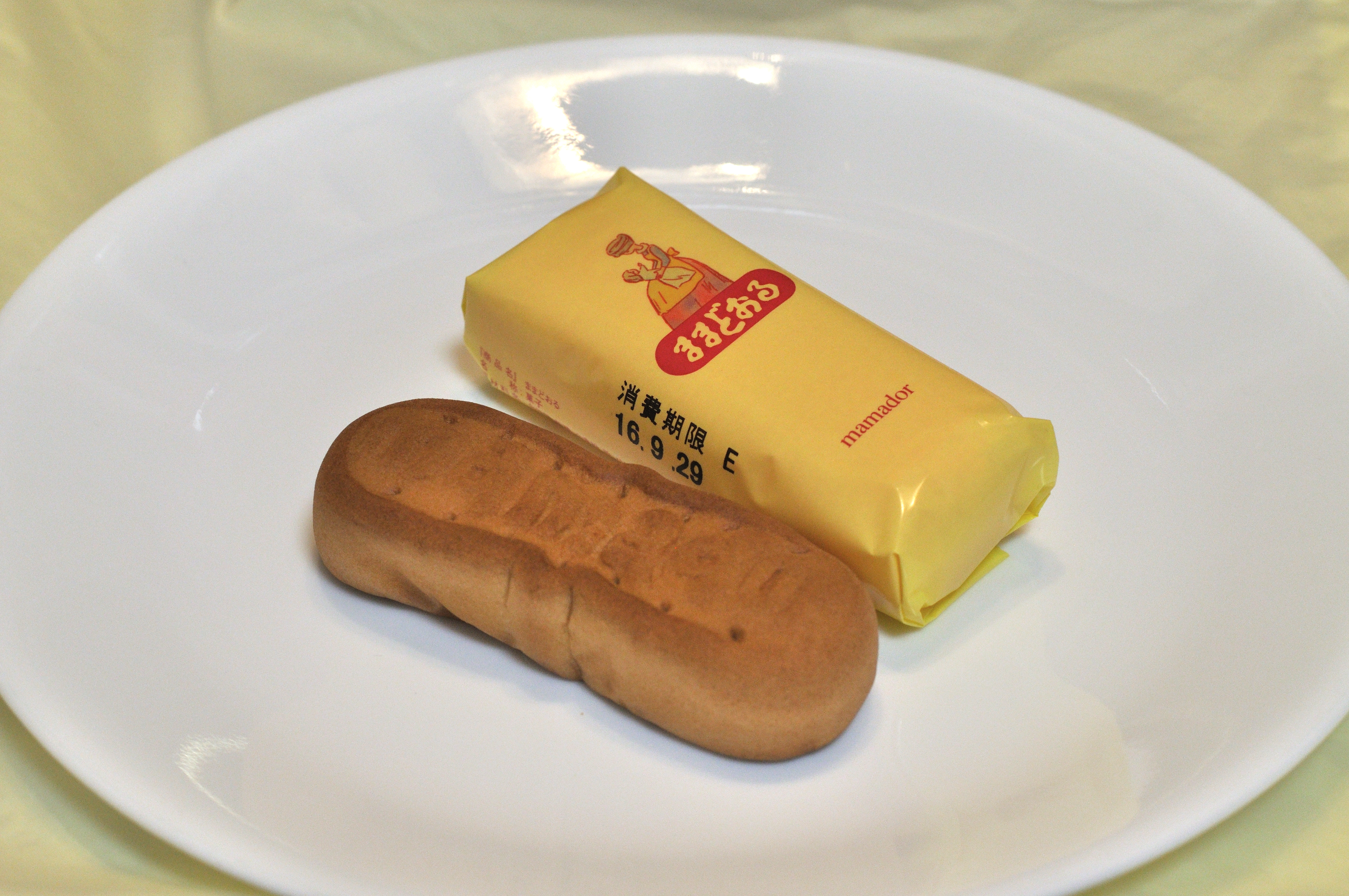 福島銘菓ままどおる